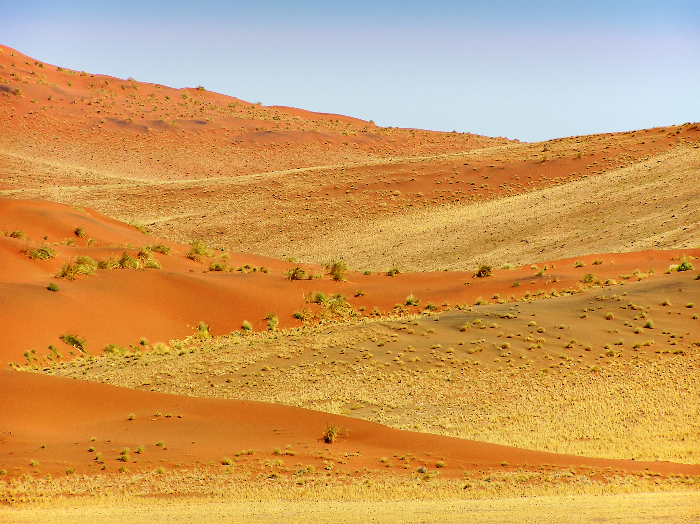 Dünen nahe dem Sossusvlei, Namib-Naukluft-Nationalpark, Namibia